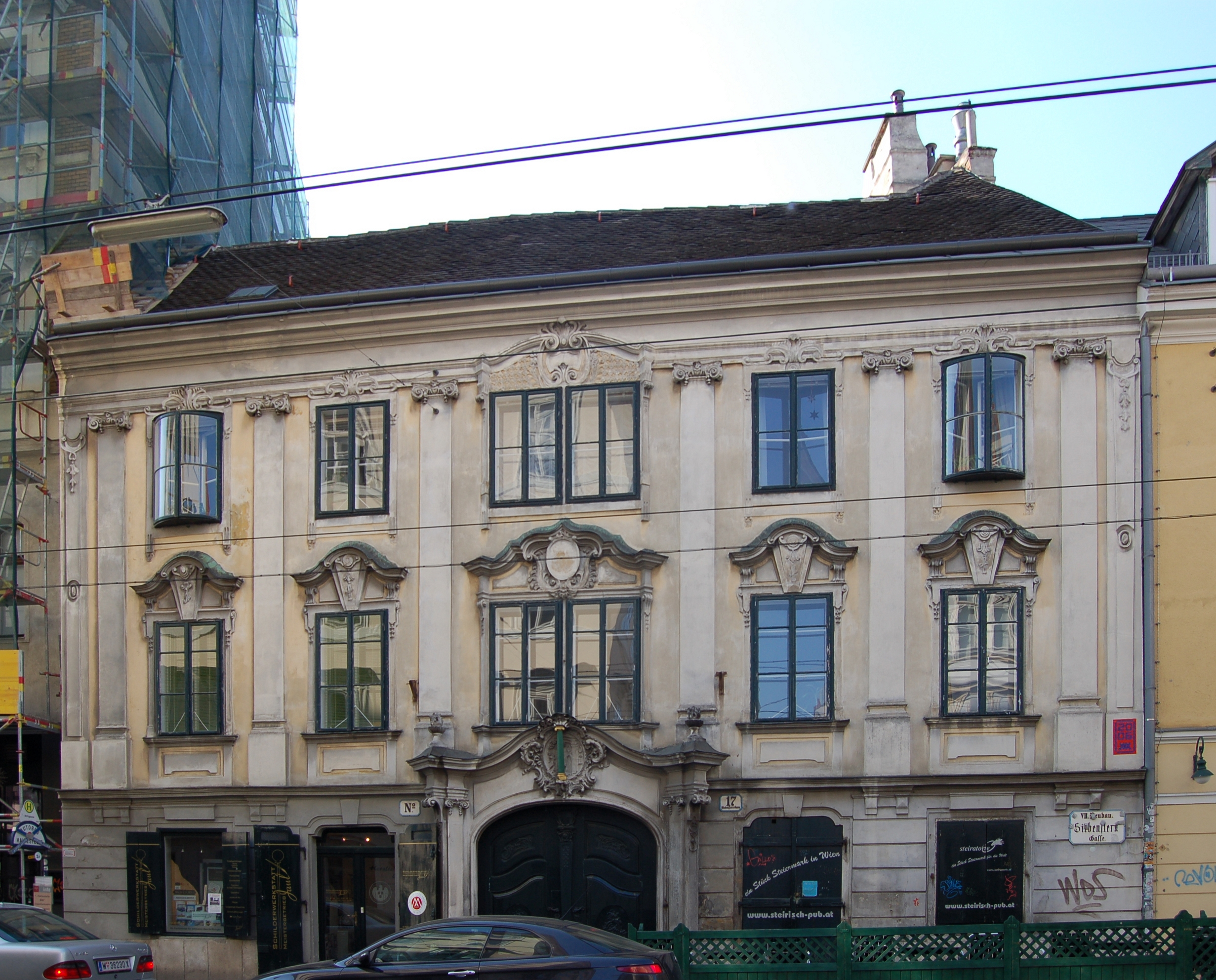 Das denkmalgeschützte Miethaus "Zur grünen Säule" in der Siebensterngasse 17 in Wien-Neubau.